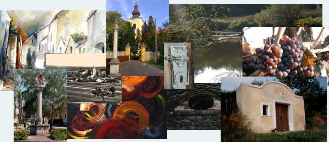 Patzmannsdorf in Wort und Bild ...